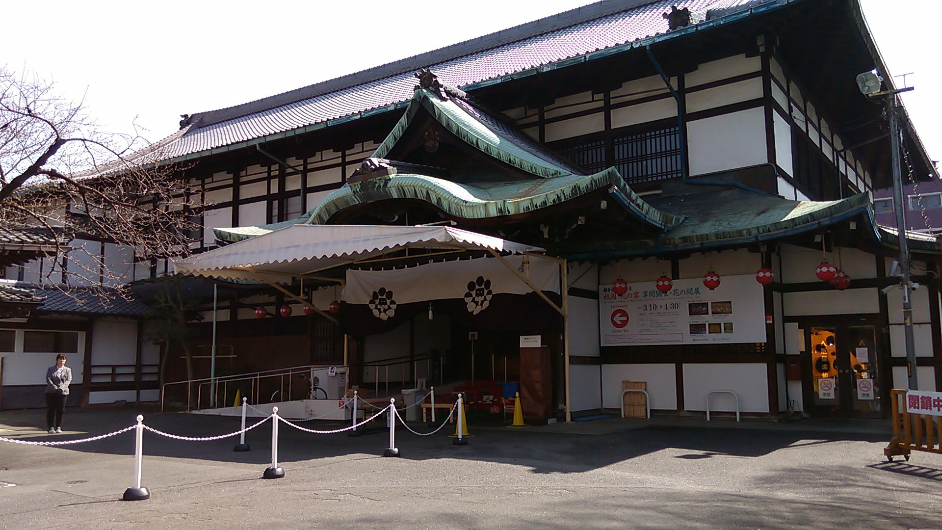 フォーエバー現代美術館 - 建物外観